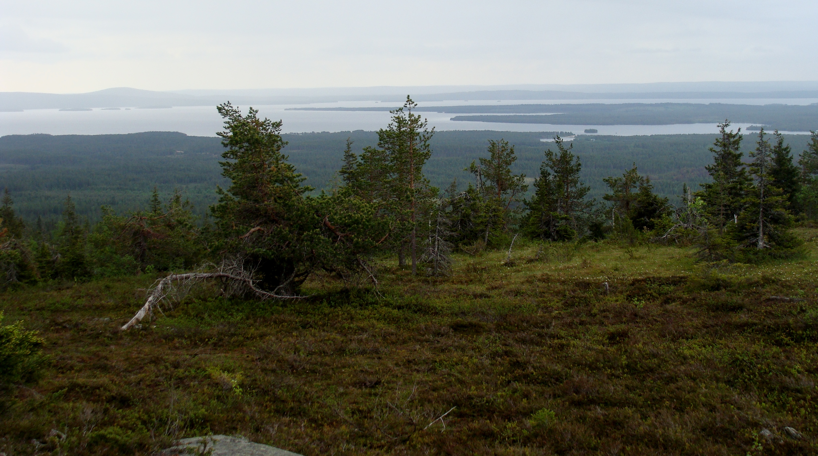 Riisitunturin kansallispuisto, Posio